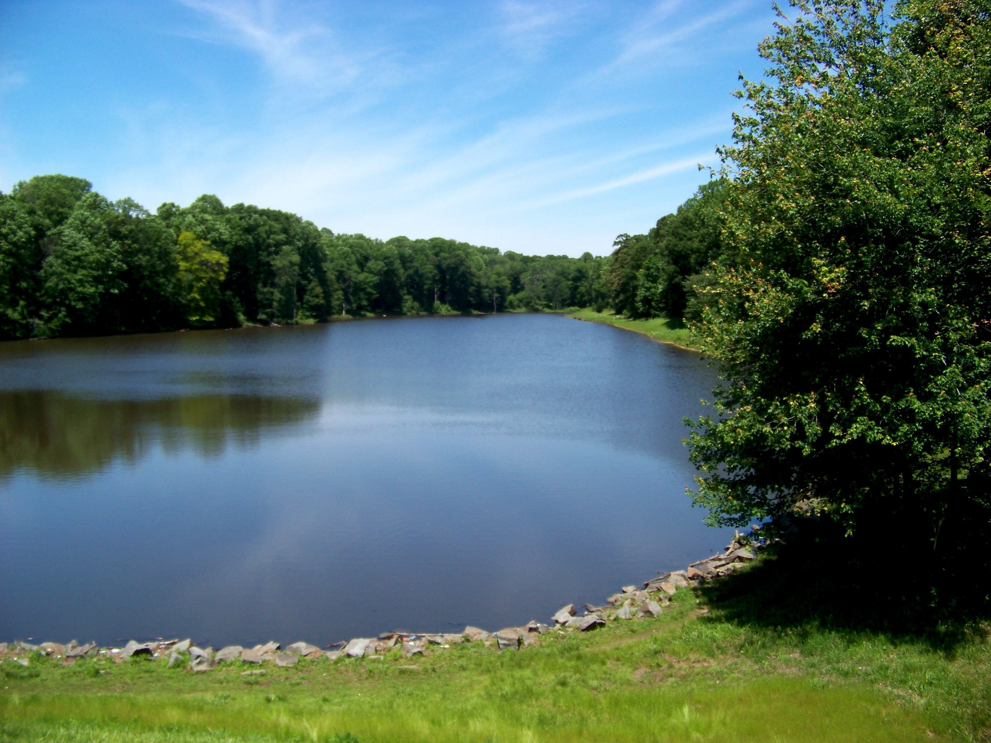 Woodglen Lake